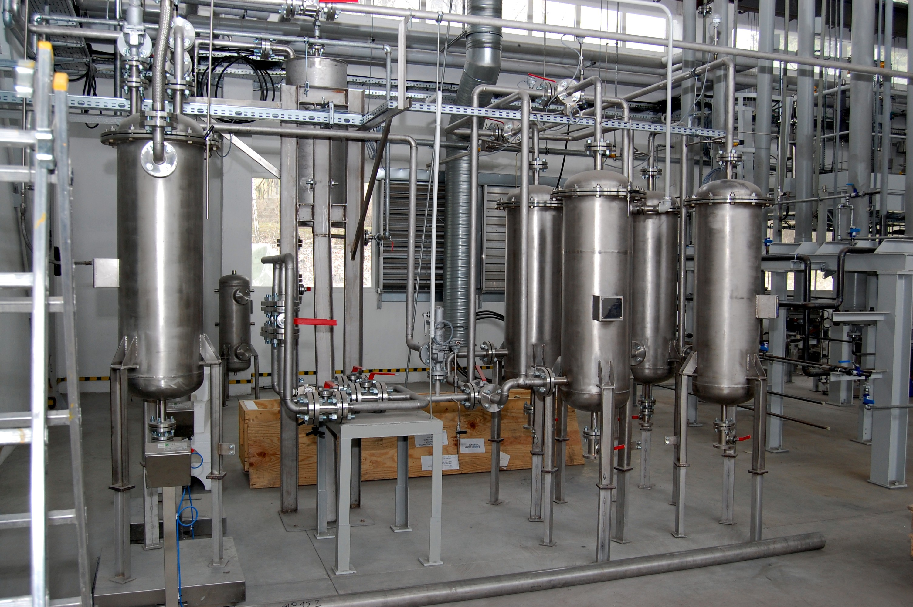 Instalacje Kopalni Doświadczalnej "Barbara"1